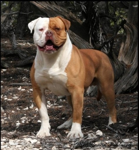 בולדוג אמריקאי - Amerikansk Bulldog